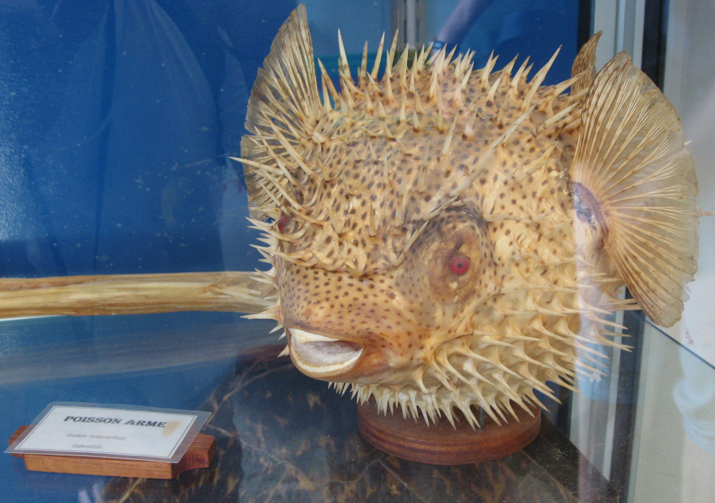 Diodon holocanthus au Fort Napoléon en Guadeloupe, îlet Terre de haut-de-haut l'archipel Saintes